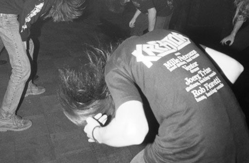 Heavy Metaller in der Disco Fantasy (1981-2001) in München-Neuaubing